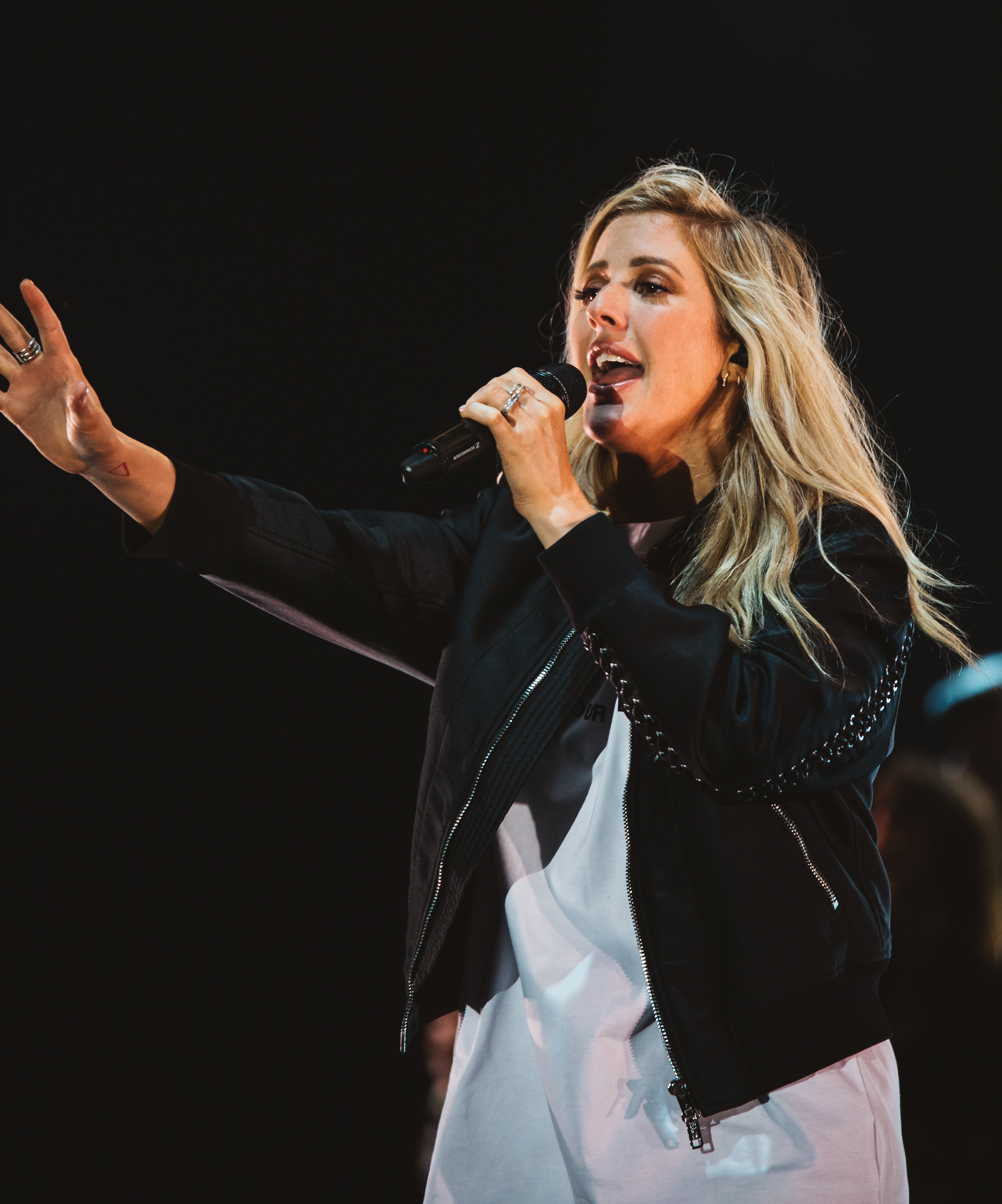 Photo: Krists Luhaers // @Kristsll